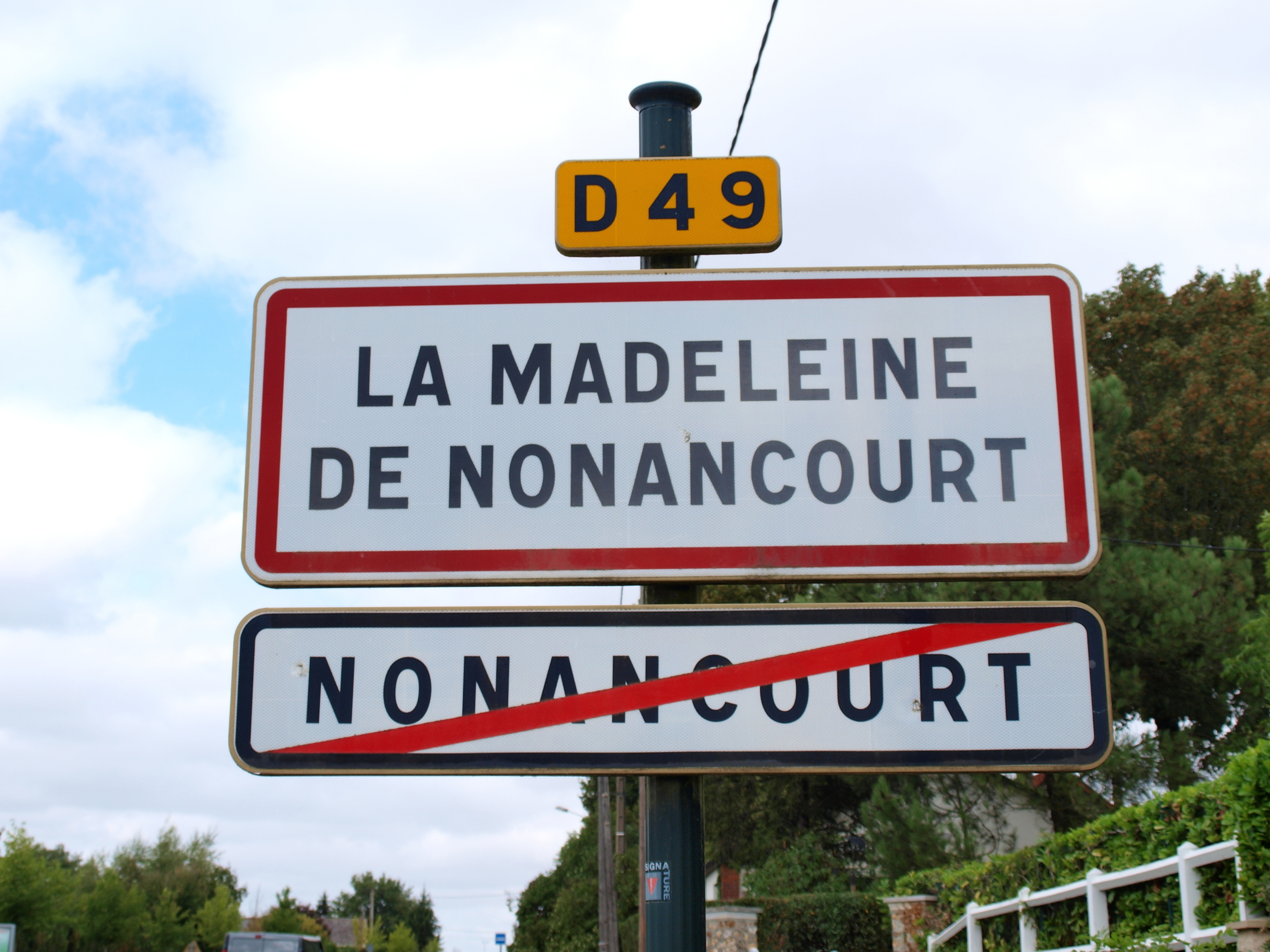 La Madeleine-de-Nonancourt (Eure, France) ; panneau d'agglomération